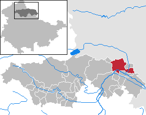 Artern in Thuringia - Kyffhäuserkreis